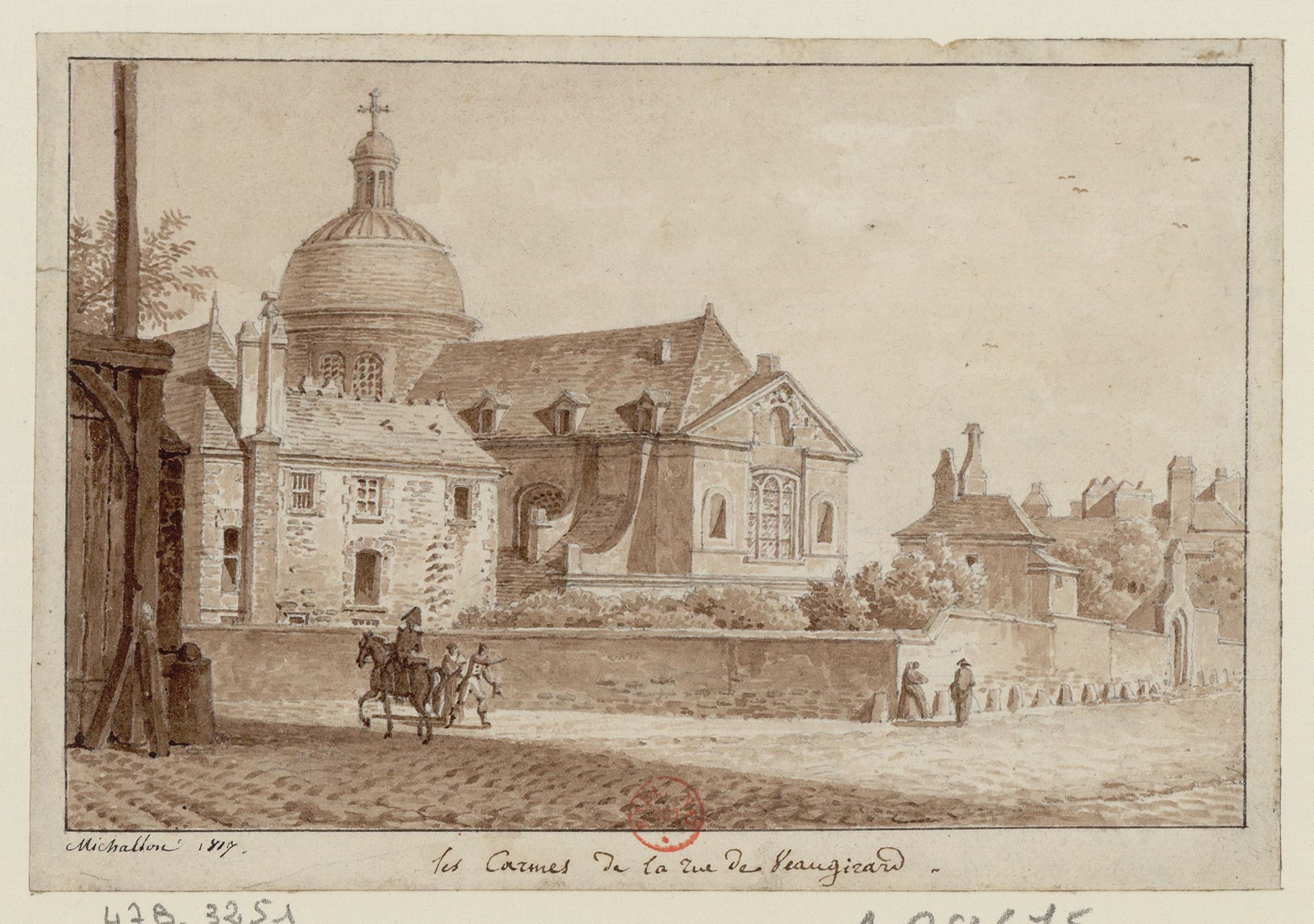 Michallon, les Carmes de Paris sur de Vaugirard.